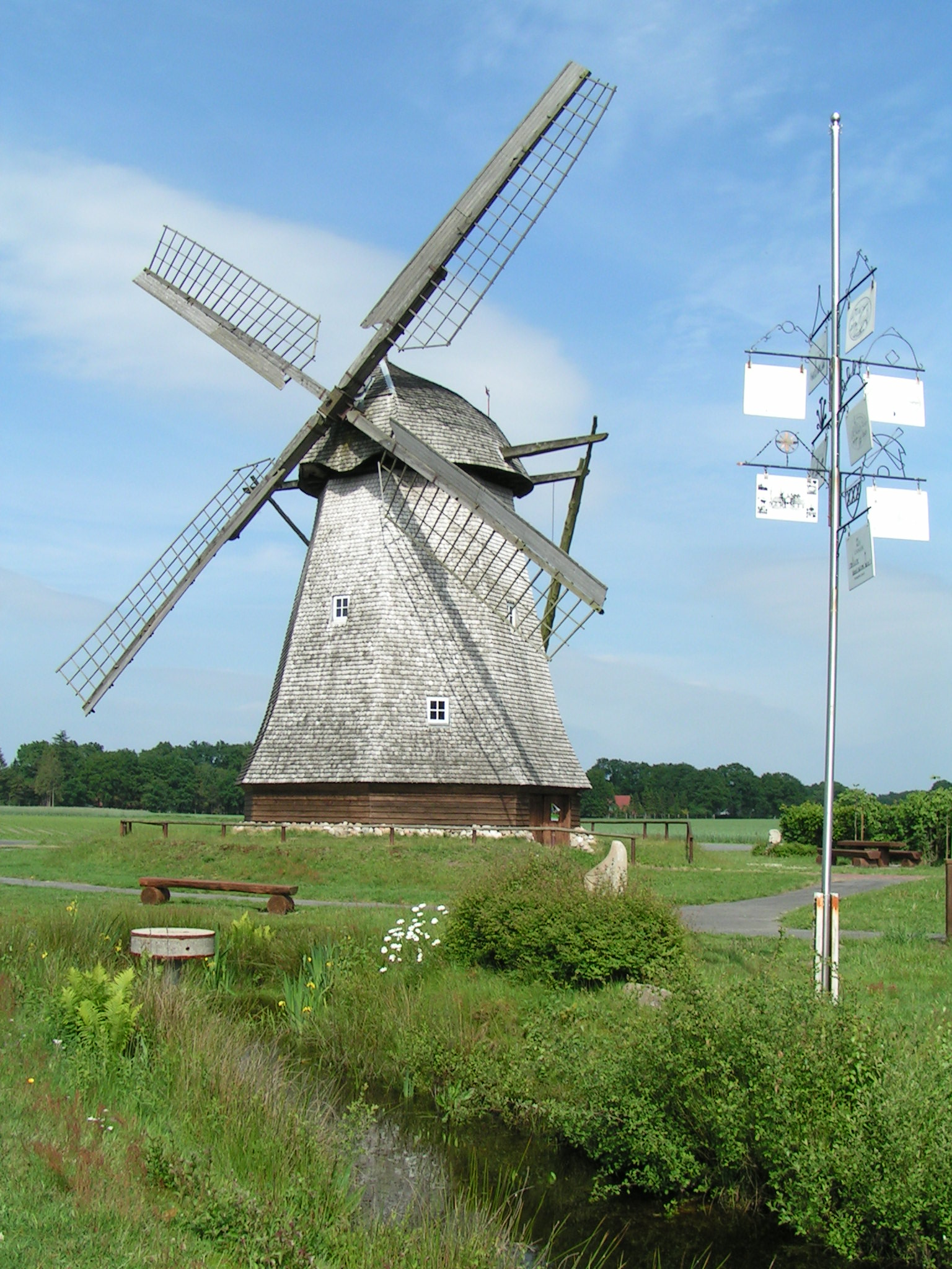 Schutenmühle (Galerie-Holländer-Windmühle) in Huckelrieden (Gemeinde Löningen, Landkreis Cloppenburg)